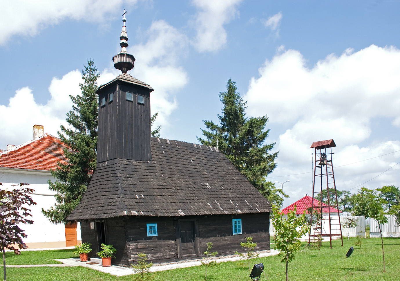 Kirche der Apostel Petrus und Paulus in Arad, Rumänien